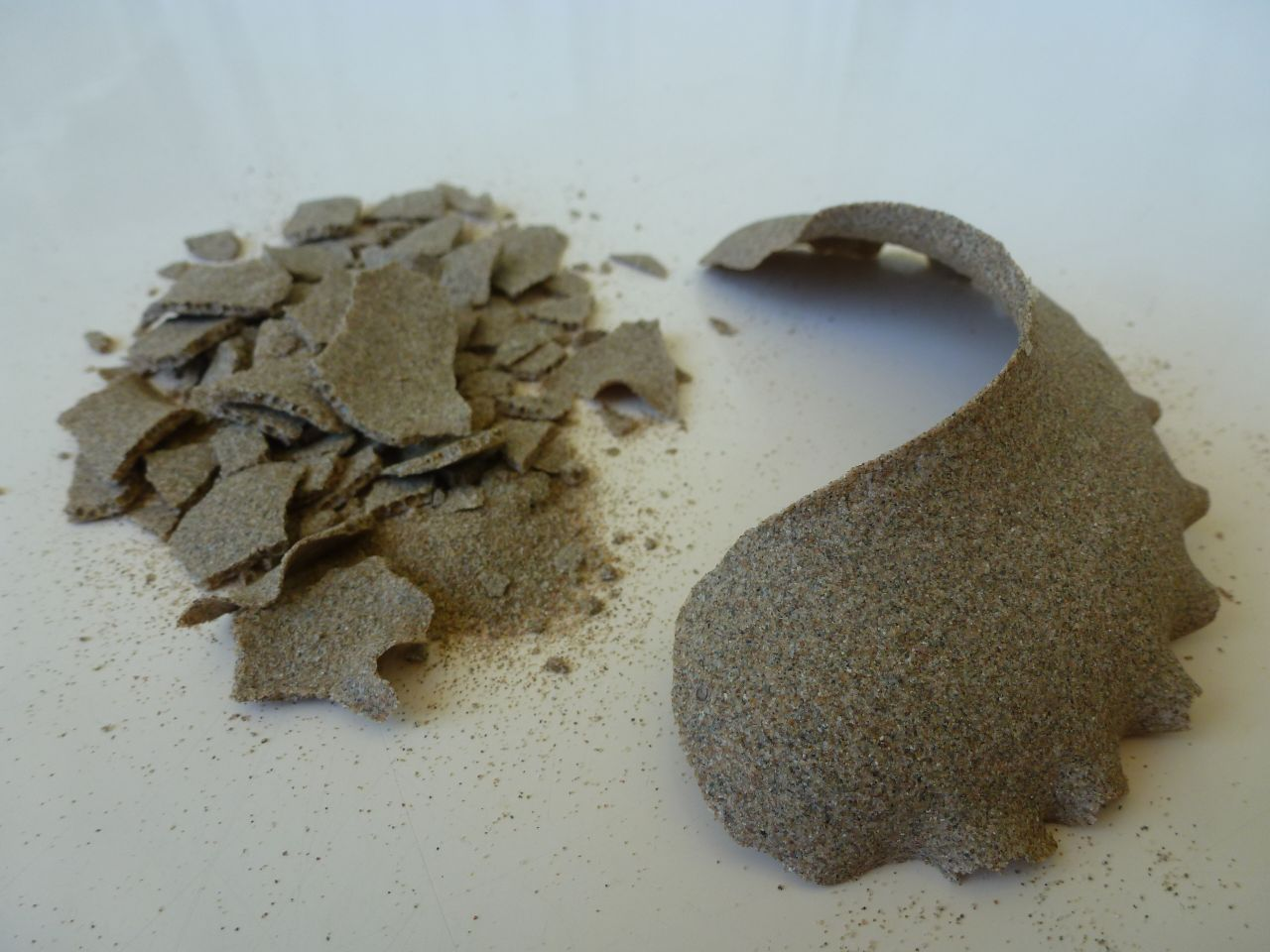 „Sandkragen“ (Eigelege) einer Mondschnecke (Familie Naticidae) im trockenen Zustand, Strandfund, Nordostspanien, Mai 2013, Breite ca. 3 cm, Durchmesser ca. 10 cm